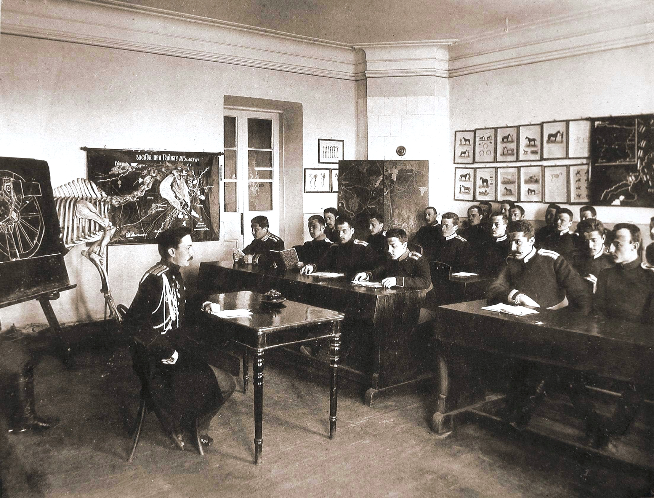 Юнкера во время занятия в классе